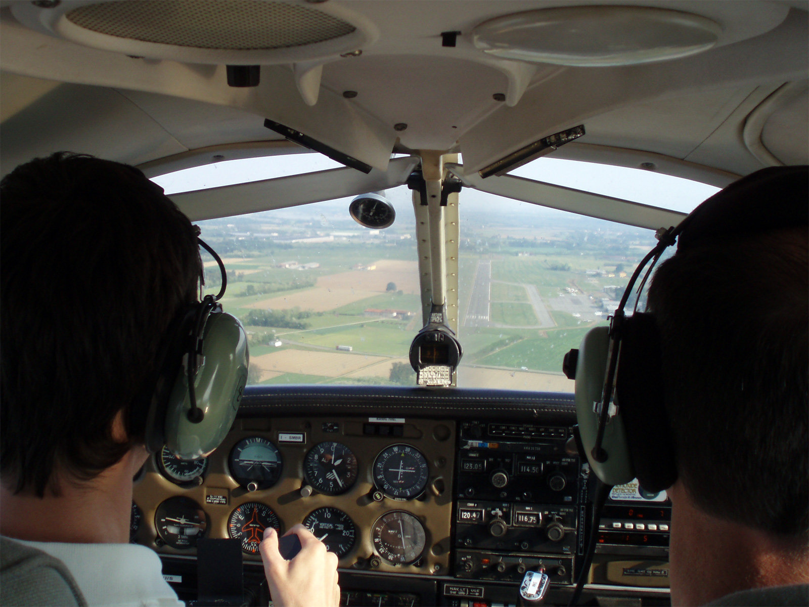 Préparez-vous à l'atterrissage